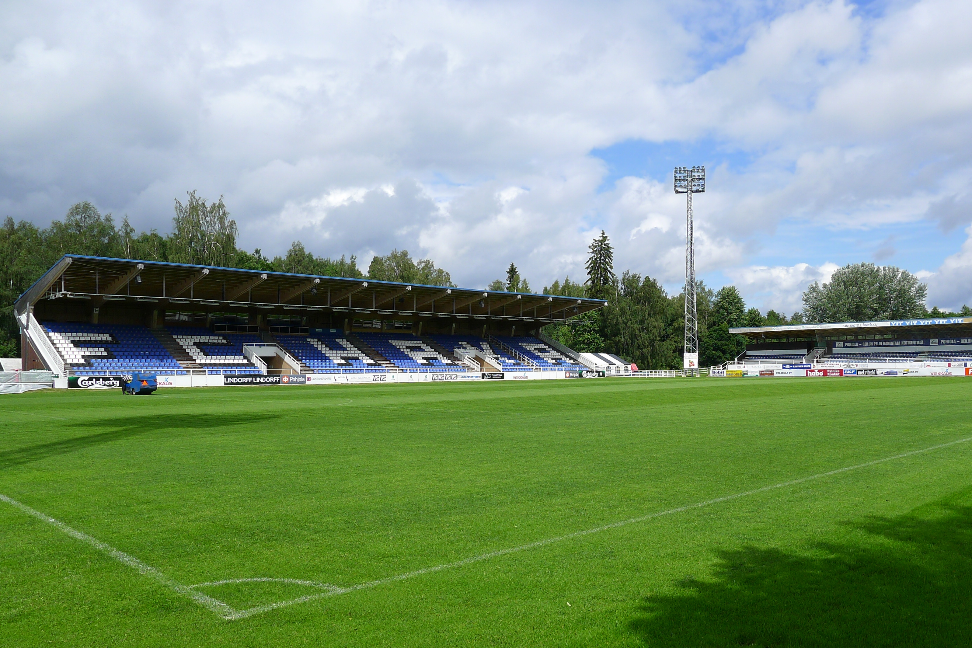 Tehtaan kenttä, 2012.